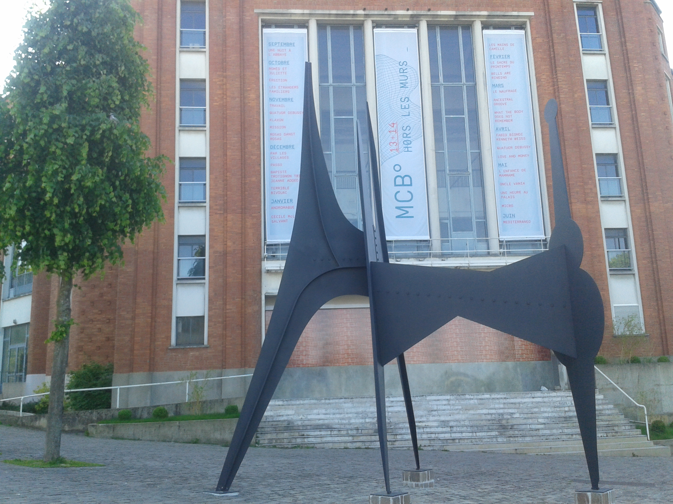 La façade actuelle de la maison de la culture de bourges